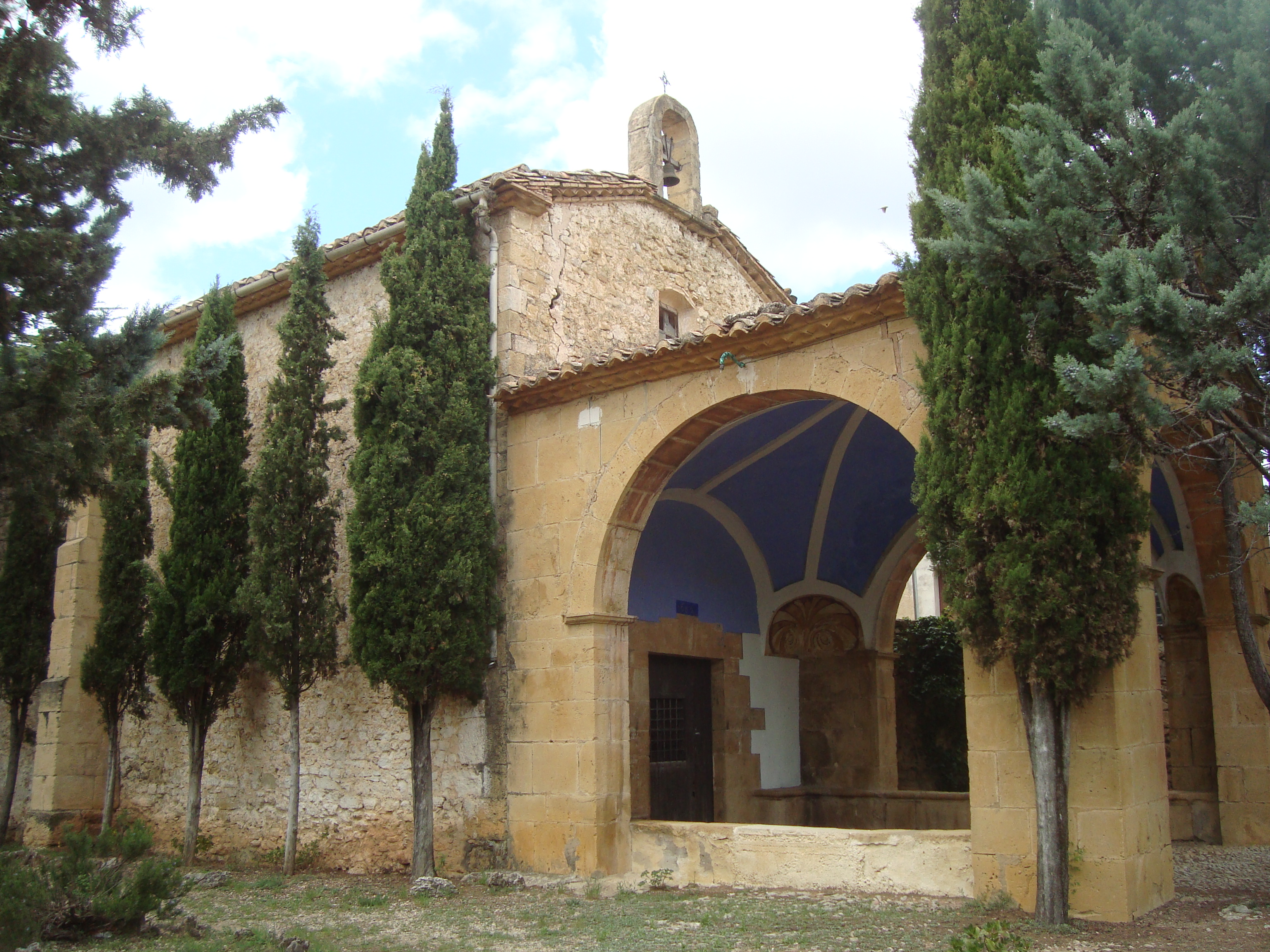 Ermita de Sant Josep (Forcall) 01.061-002.